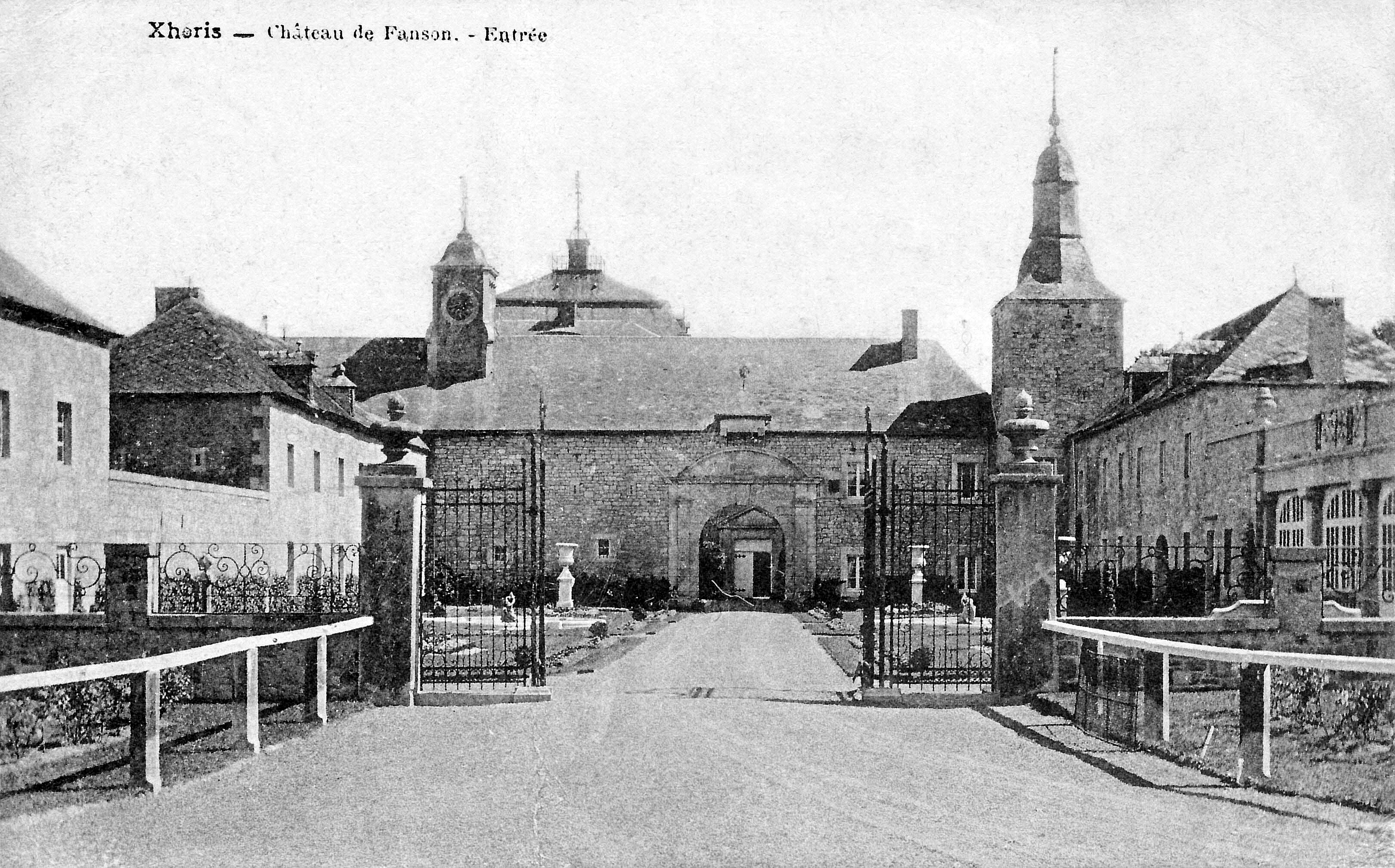 Entrée du château de Fanson. Carte postale ancienne affranchie en 1928 (cachet de la poste).